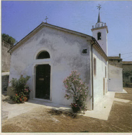 PD-link